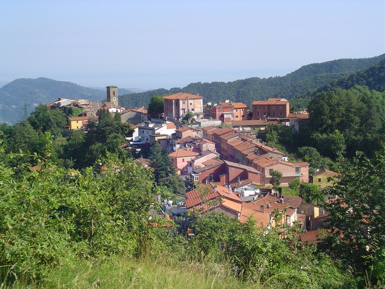 Panoramica del paese di Castelpoggio dalla località Cannoa (Nord)